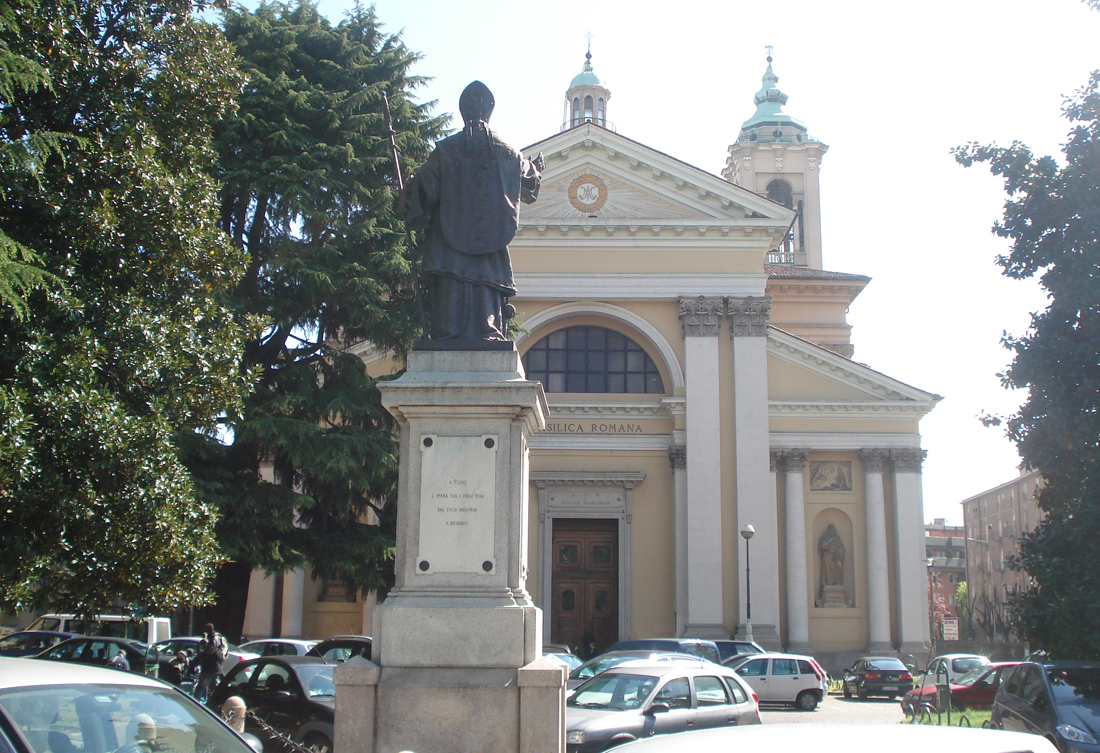 La facciata del Santuario di Rho